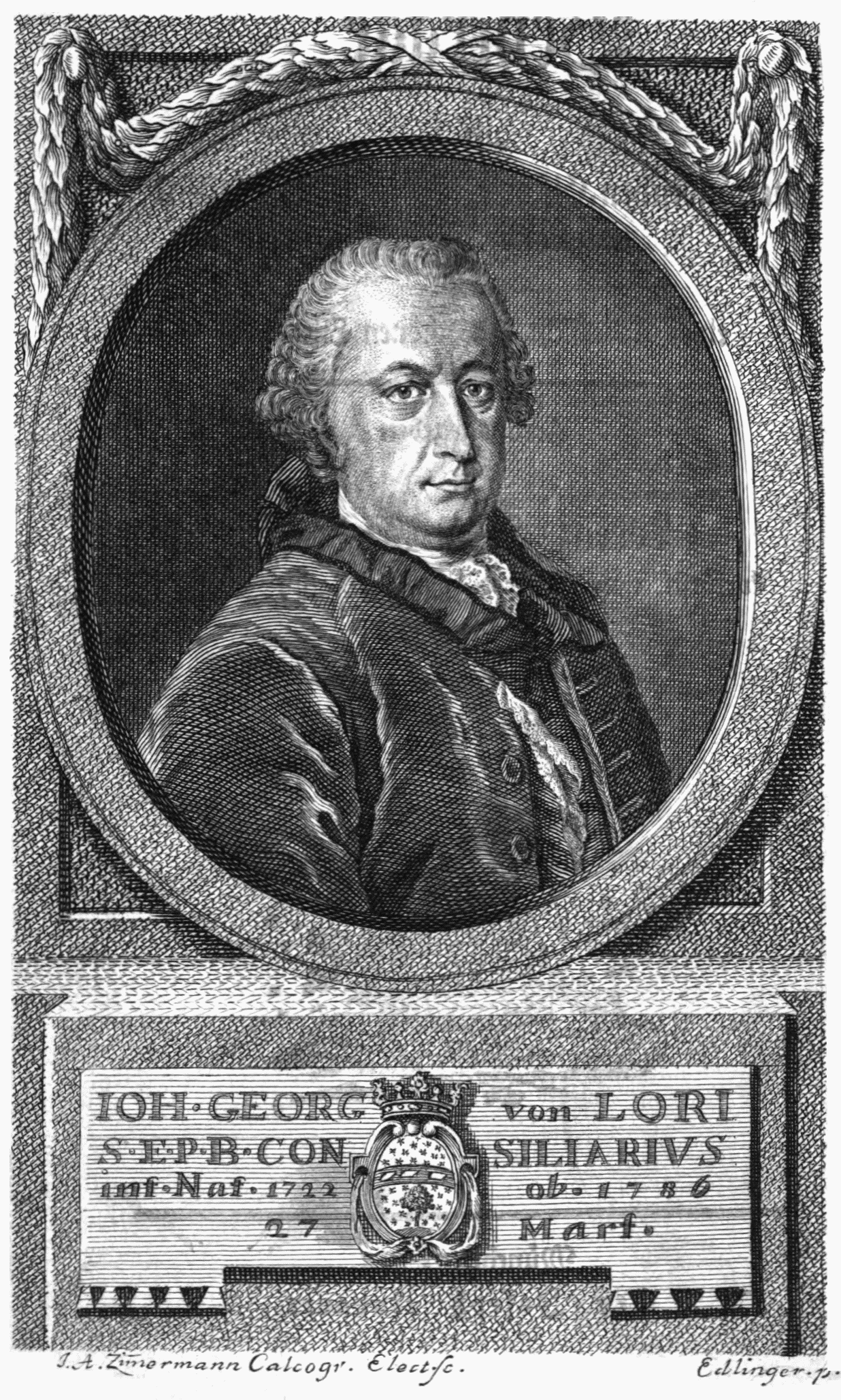 "Ioh. Georg von Lori / S. E. P. B. consiliarius / int. Nat 1711 / ab. 1786 / 17 Mart."